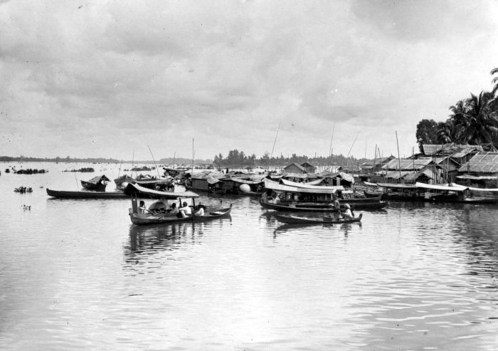 Repronegatief. Z. en O. Afd. Borneo. De Baritonrivier bij Bandjermasin; de prauwen liggen voor de uitmonding van de Martapoerarivier te wachten in de Barito op het gunstige getij, den vloed (die ver de Barito opdringt en de Martapoerarivier binnen) om op te varen naar de hoofdplaats. . De Baritonrivier bij Bandjermasin